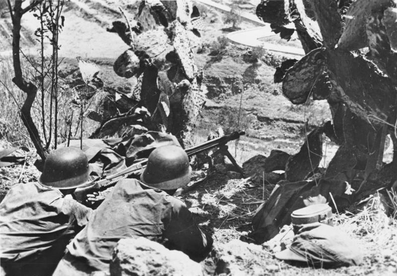 Sizilien, MG-Stellung ADN-ZB /Archiv II. Weltkrieg 1939-1945 An der Front in Italien: MG-Stellung der faschistischen deutschen Wehrmacht auf einer Anhöhe in Sizilien. Aufnahme: Anfang Juli 1943/Dohm [Scherl Bilderdienst]